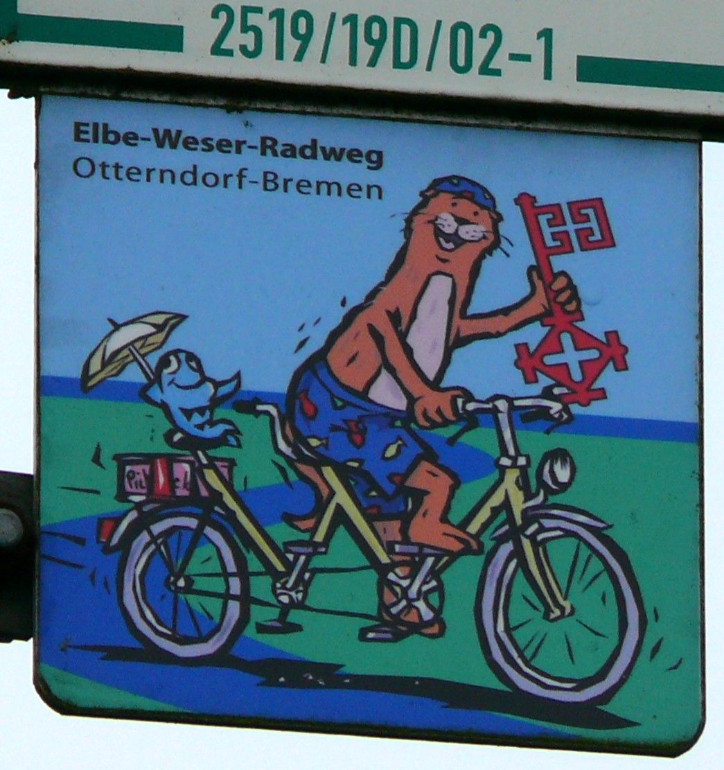 "Otti" - Logo des Elbe-Weser-Radweges zwischen Otterndorf und Beverstedt